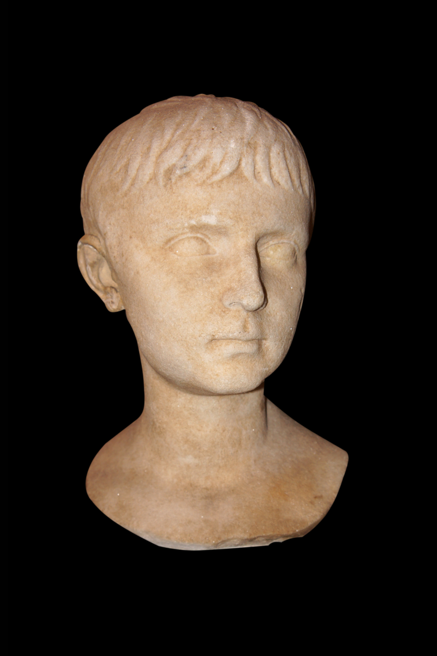 Ritratto di Lucio Cesare bambino